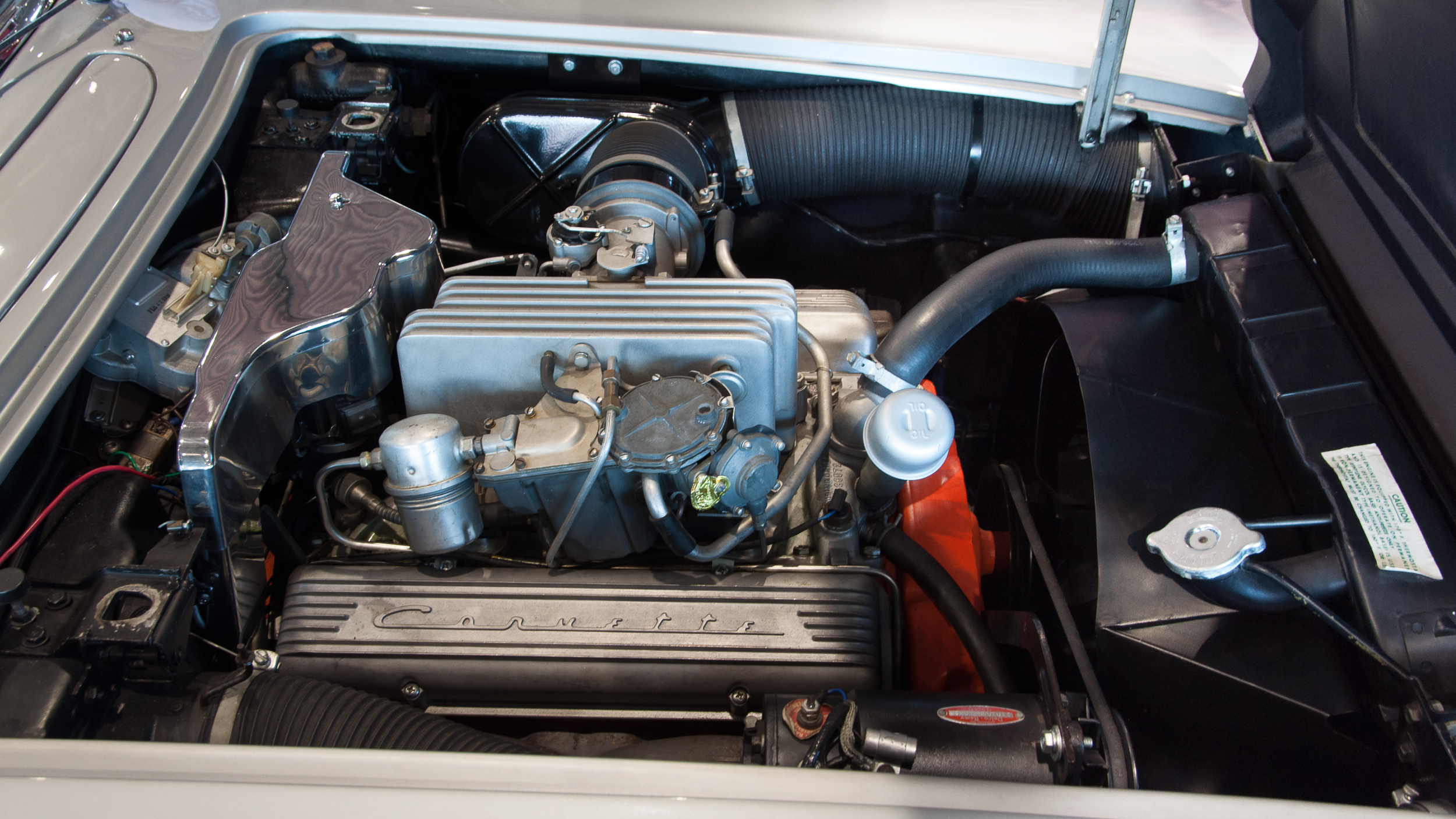 1959 Chevrolet Corvette C1 V8-Motor mit Kraftstoffeinspritzung